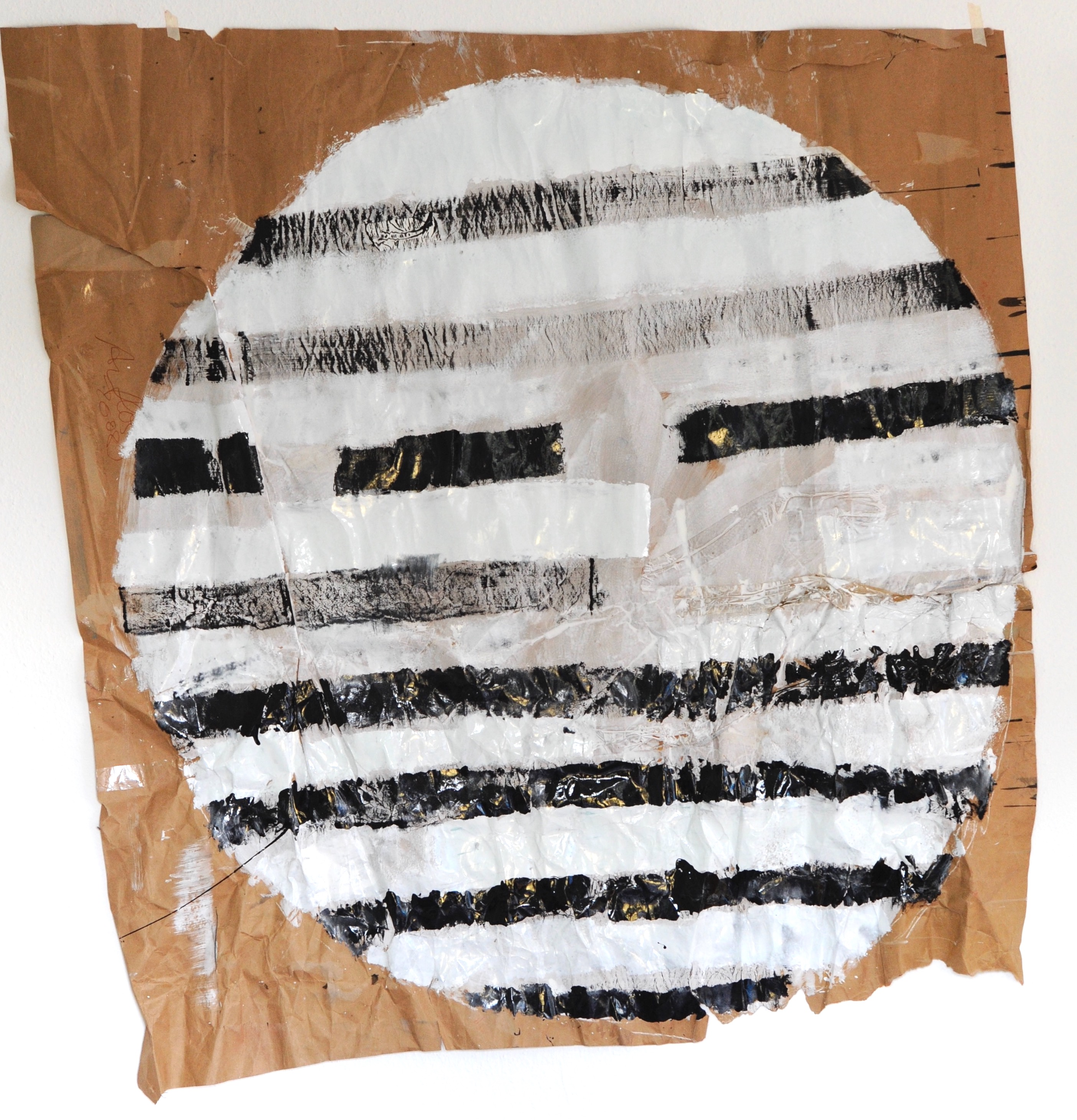 Asta von Unger, Determination 04, Lack auf Papier, 2012 154x170cm